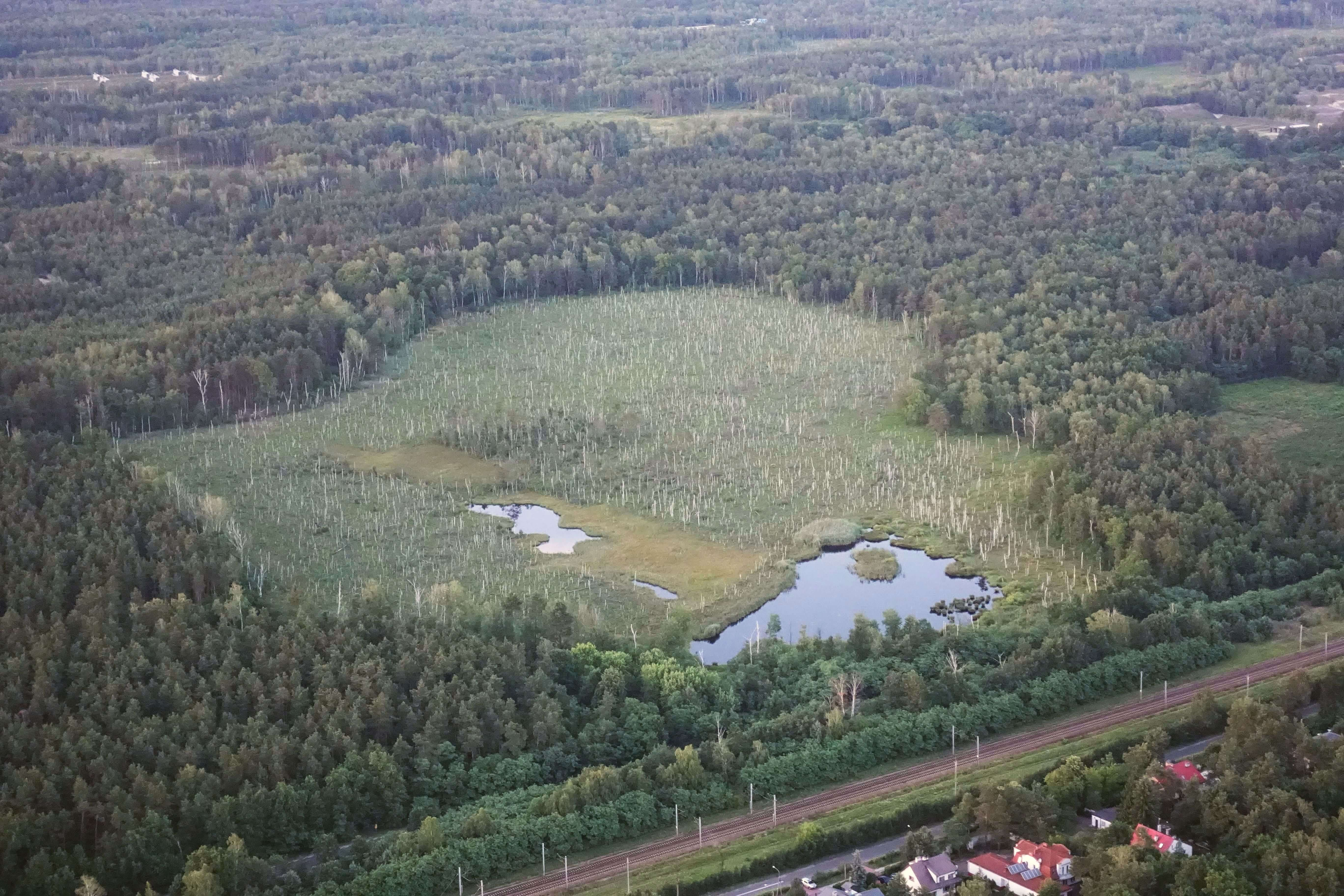 Bagno Jacka w Warszawie-Wesołej